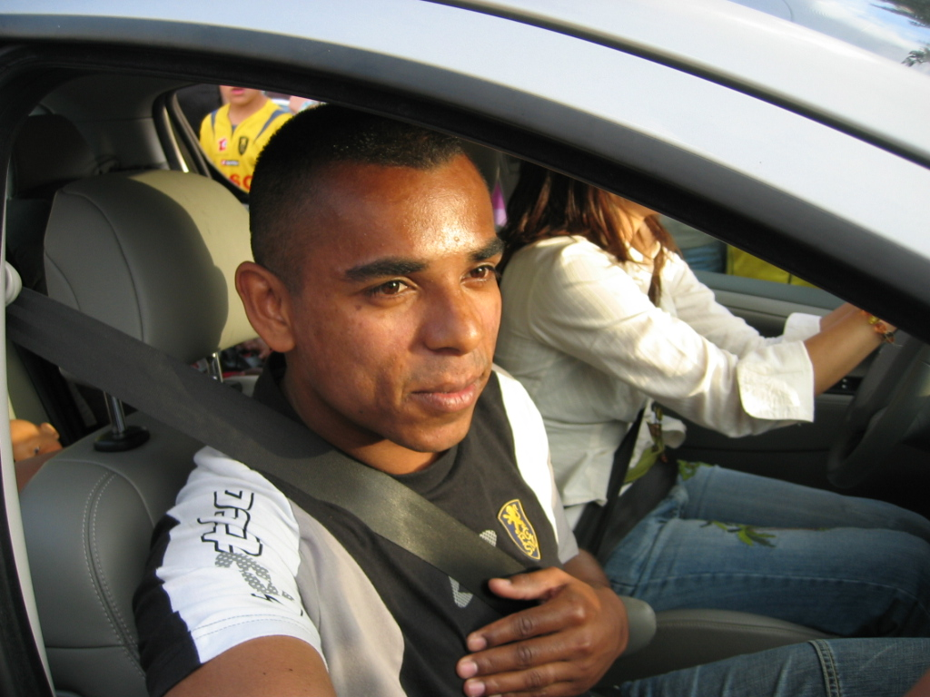 Álvaro Santos, attaquant du FC Sochaux, vainqueur de la Coupe de France 2007, le jour du retour du FC Sochaux du Stade de France à Sochaux